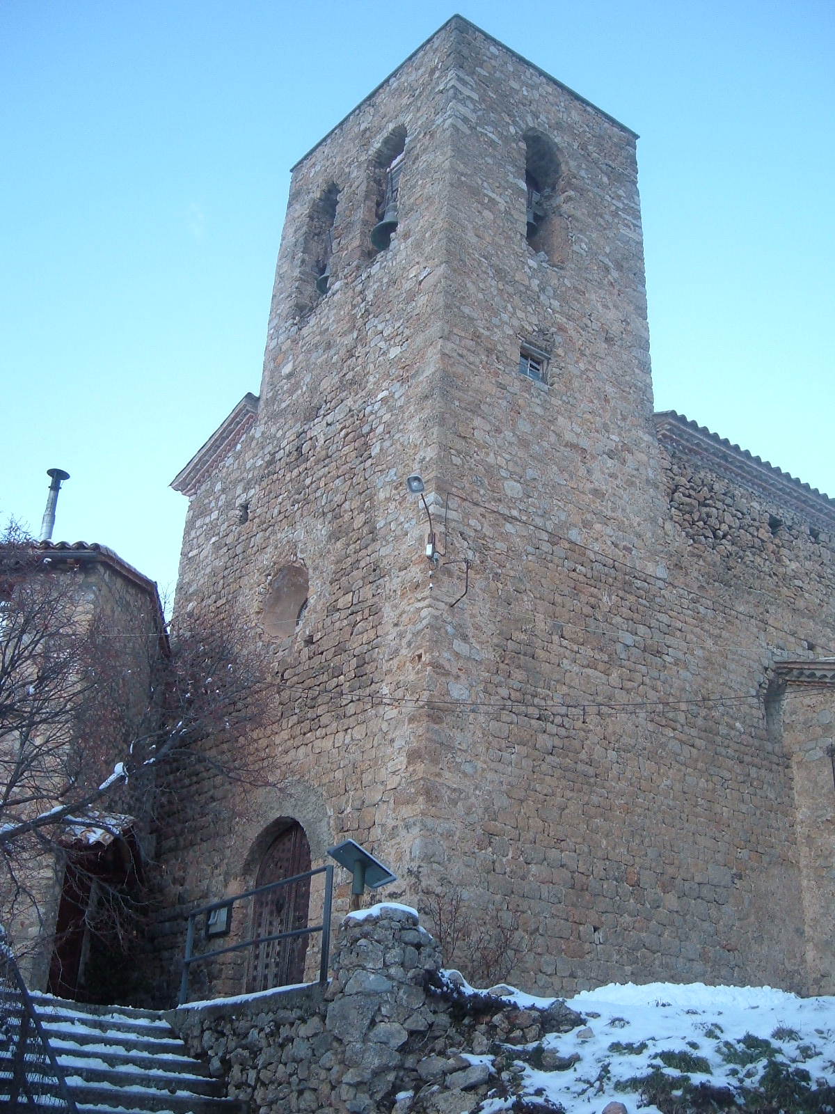 Façana oest de l'església de Sant Esteve de Tuixent